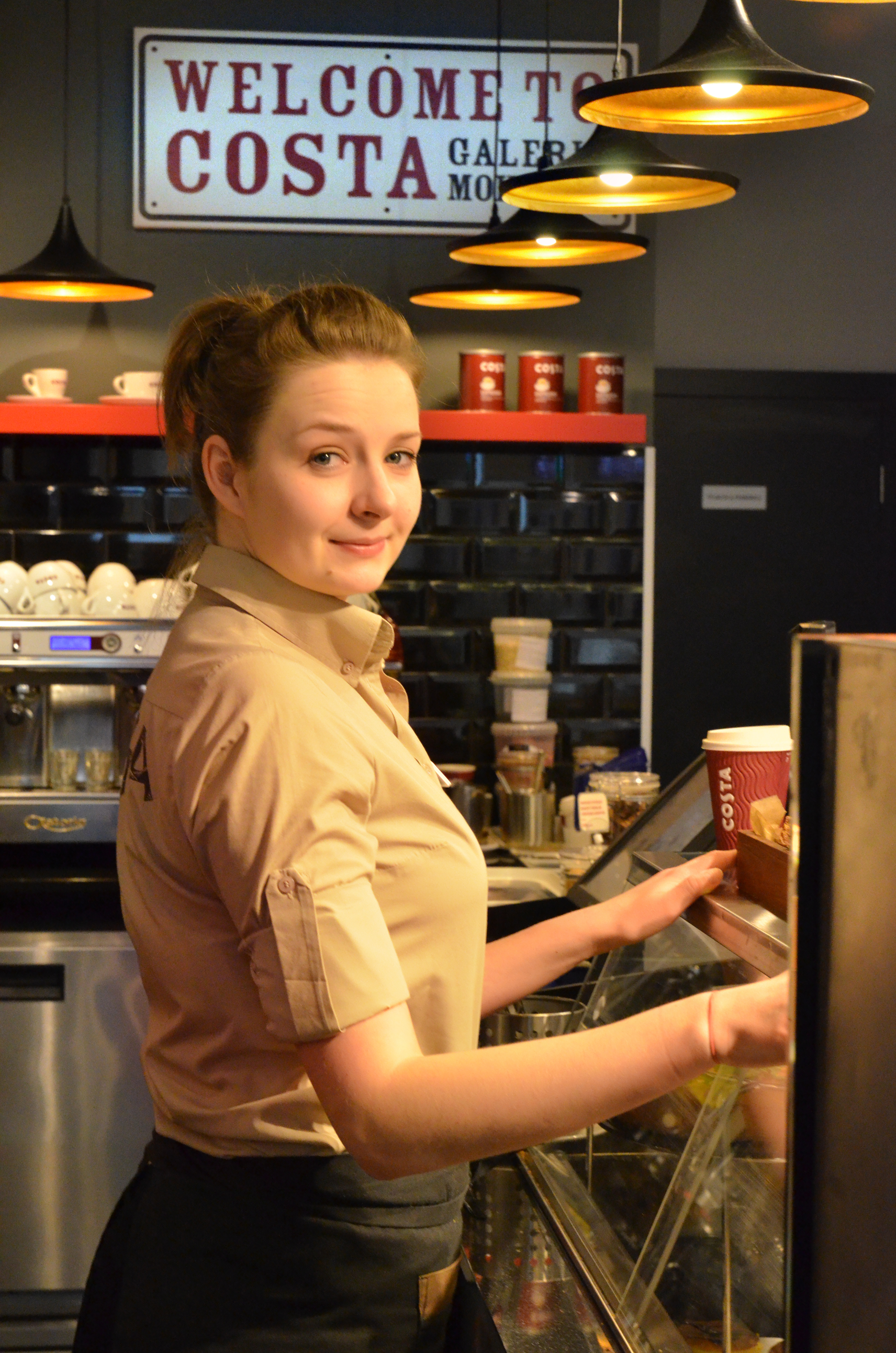 Baristka COSTA COFFEE - kawiarnia w Galerii Mokotów, Warszawa